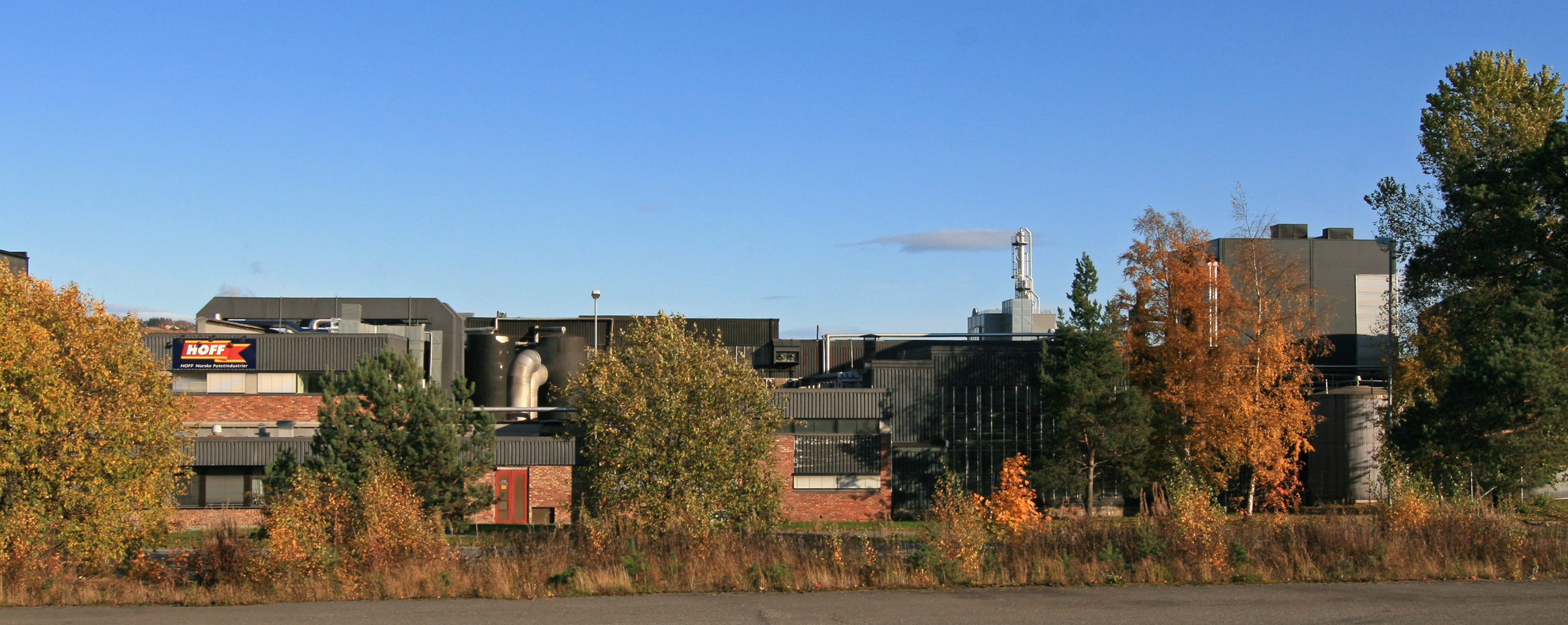 Hoff Norske Potetindustrier, Gjøvik.